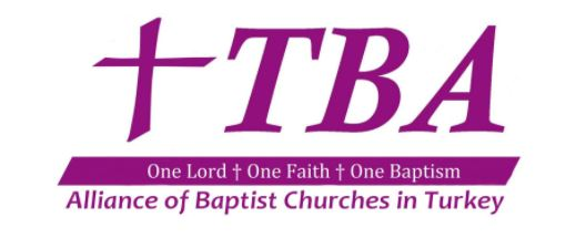 Logo der türkischen Baptistenunion